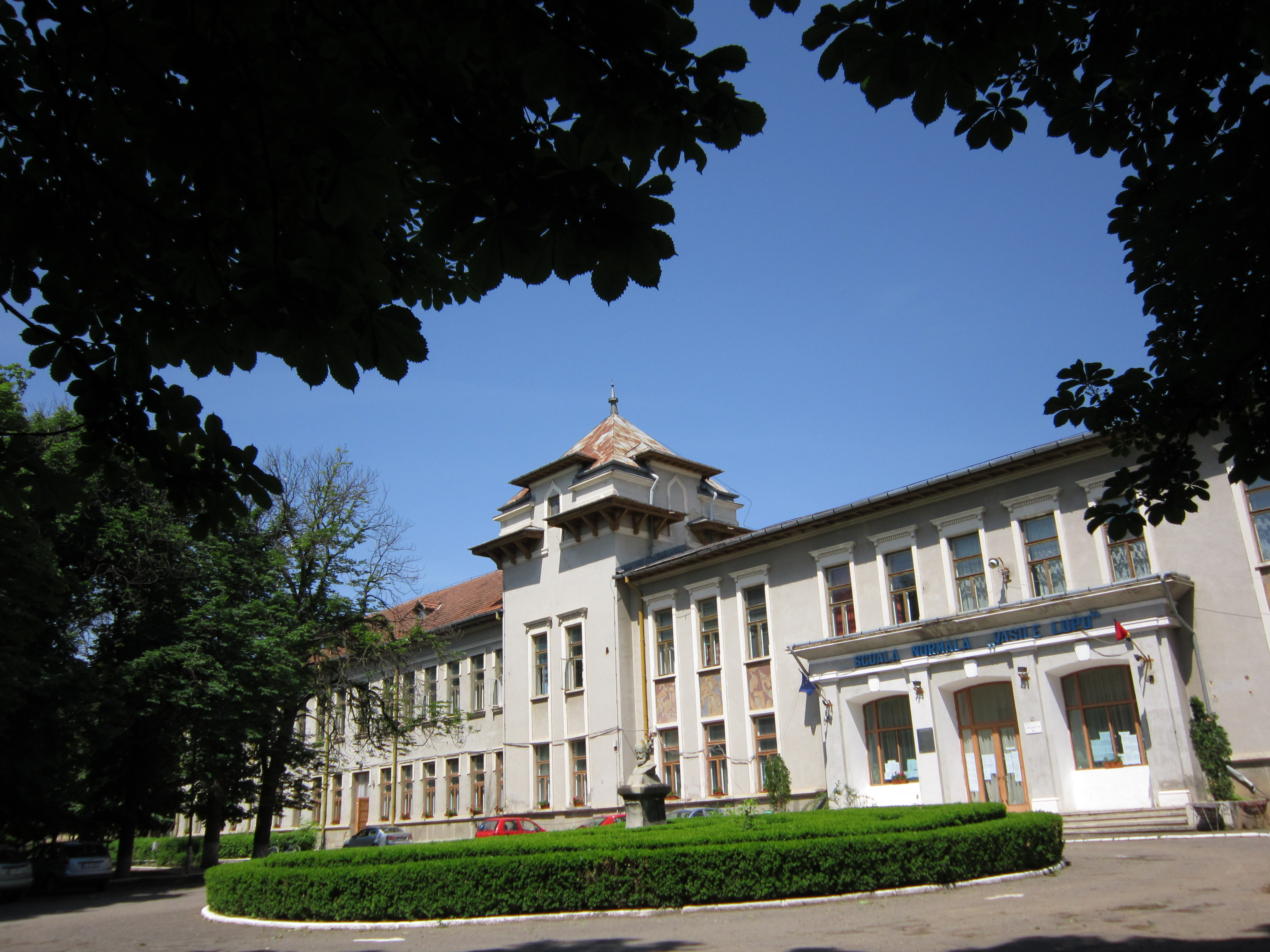 Școala Normală "Vasile Lupu" corp vechi